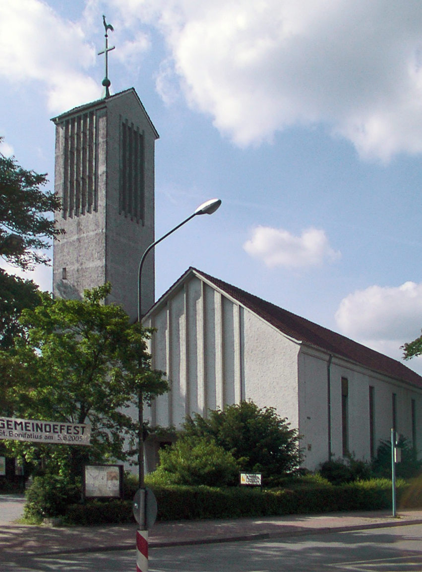 Bielefeld: Katholische Kirche Sankt Bonifatius in Stieghorst